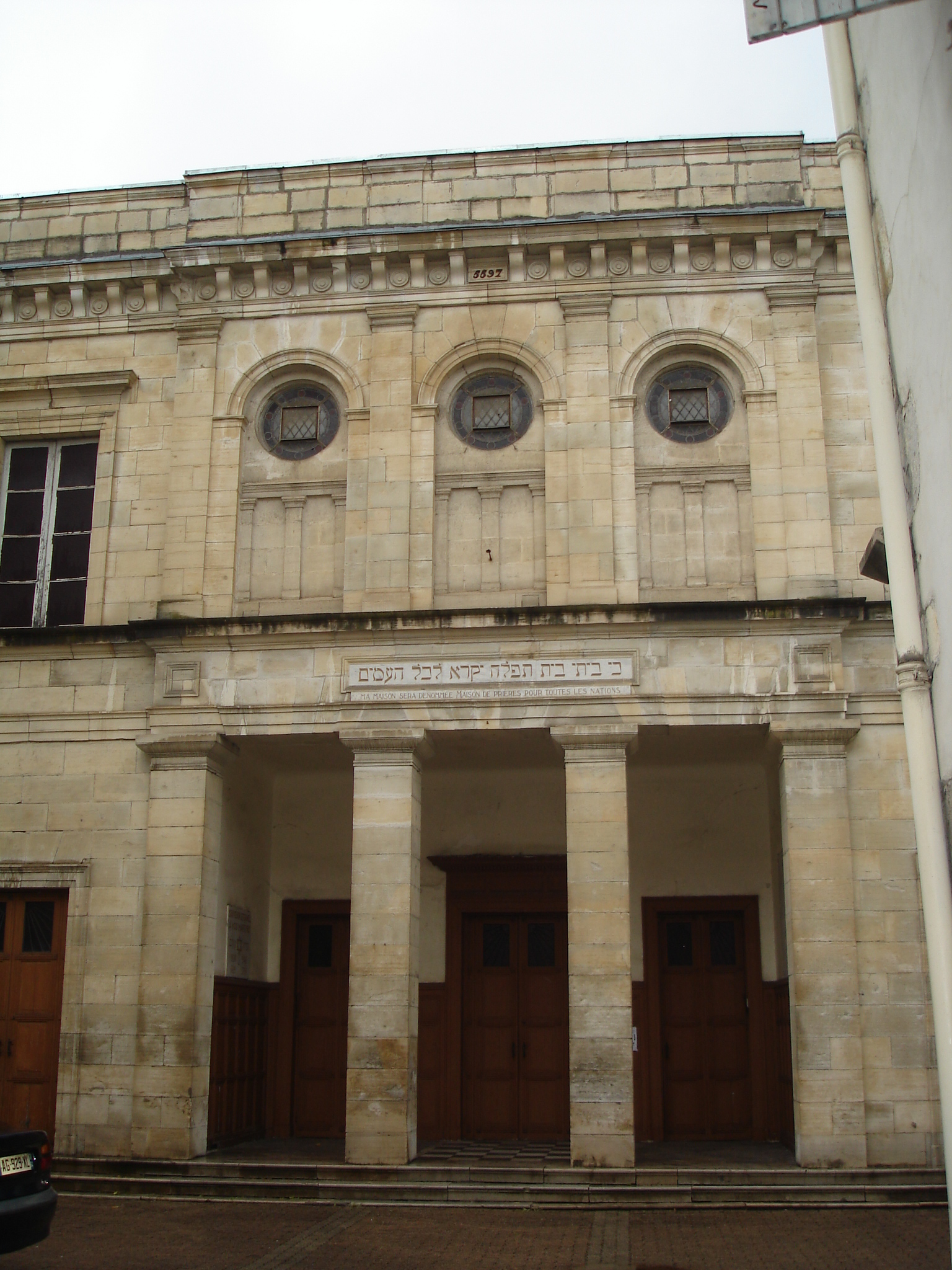 Synagogue of Bayonne, Pyrénées-Atlantiques, France